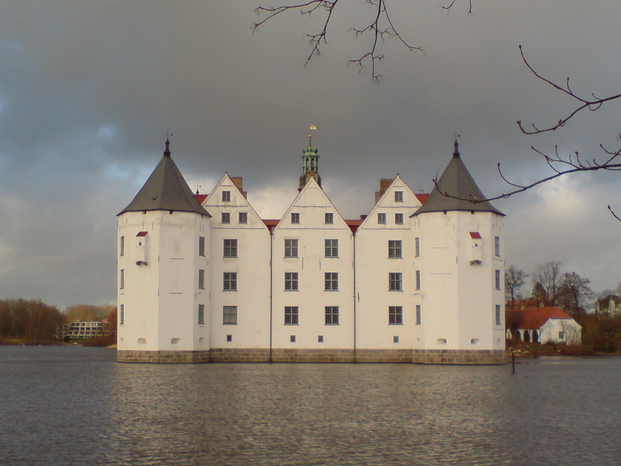 Glücksburg, Südfassade